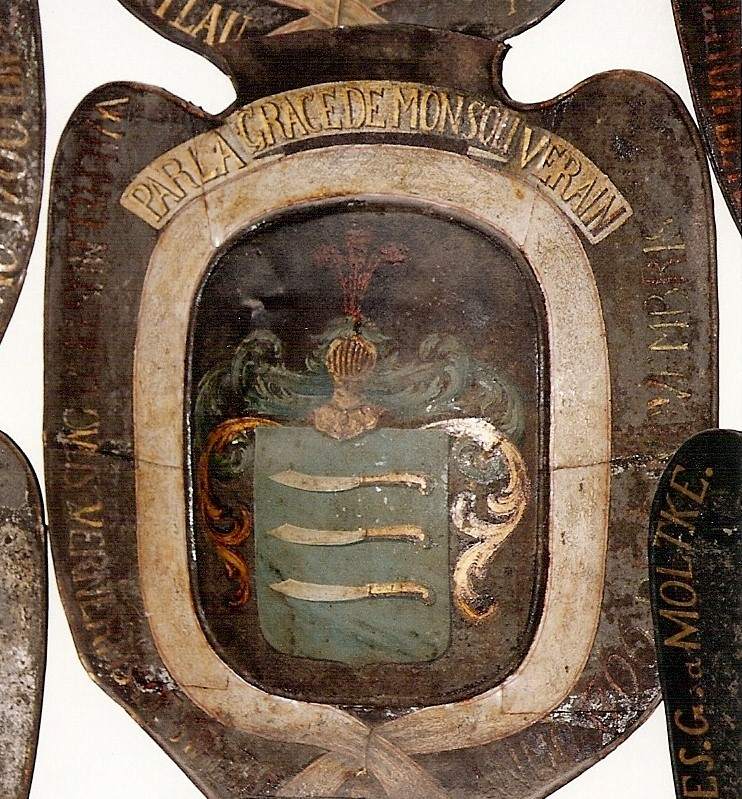 Tilhørende overstaldmester Wilhelm Ditlev Werner v. Staffeldt, f. 1742, d. 1801. Bannertekst: ”PARL A GRACE DE MON SOUVERAIN”